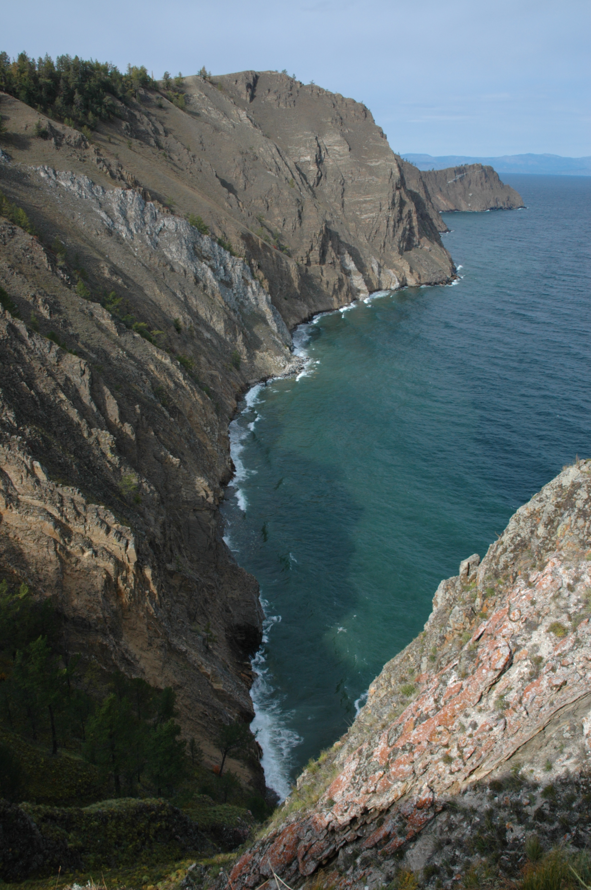 Olkhon Island and Lake Baikal